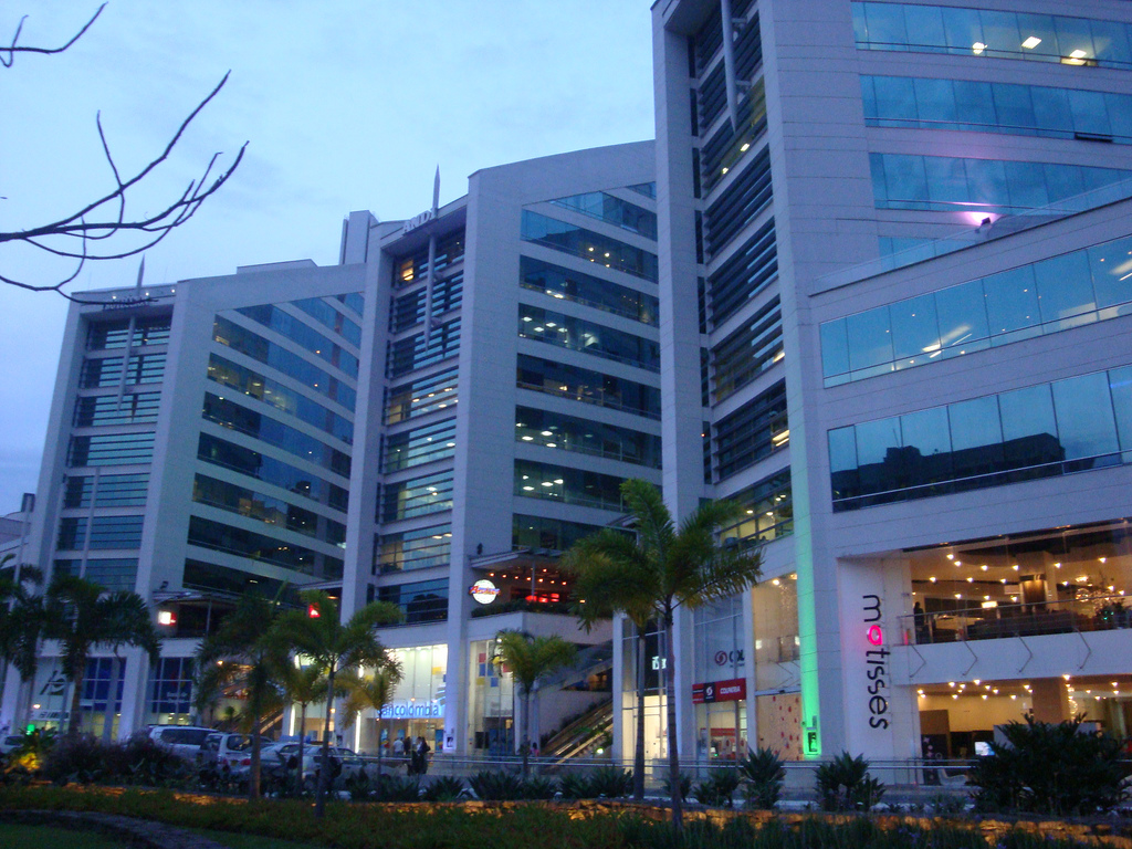 Vista parcial de El Poblado tomada desde el Barrio Castropol.